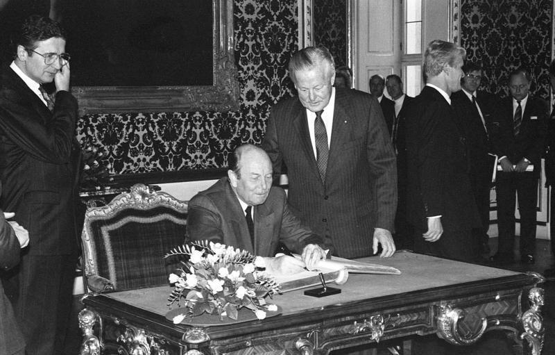 20.-21.12.1990 Konferenz der Regierungschefs der 16 Bundesländer der Bundesrepublik Deutschland in München 20.12. Empfang durch den bayerischen Ministerpräsidenten, Max Streibl, im Prinz-Carl-Palais Eintragung in das Gästebuch der bayerischen Staatsregierung